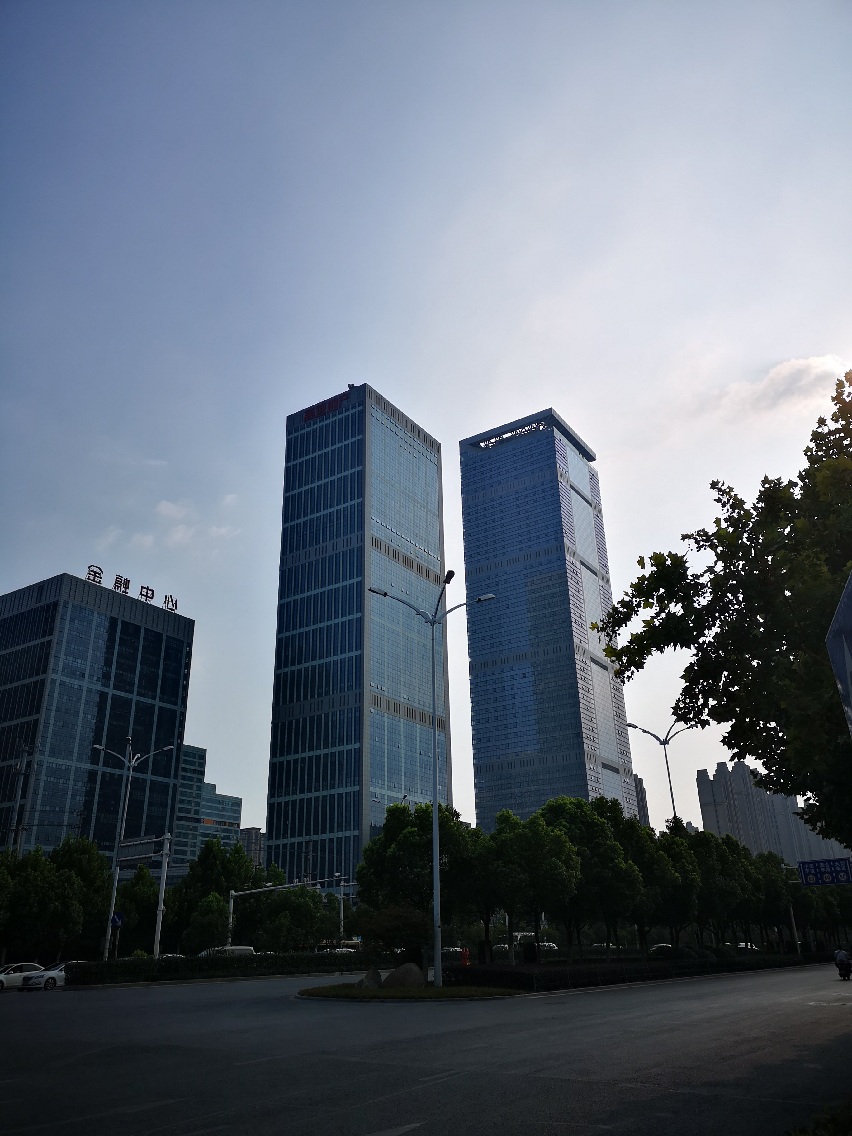 高速·时代广场